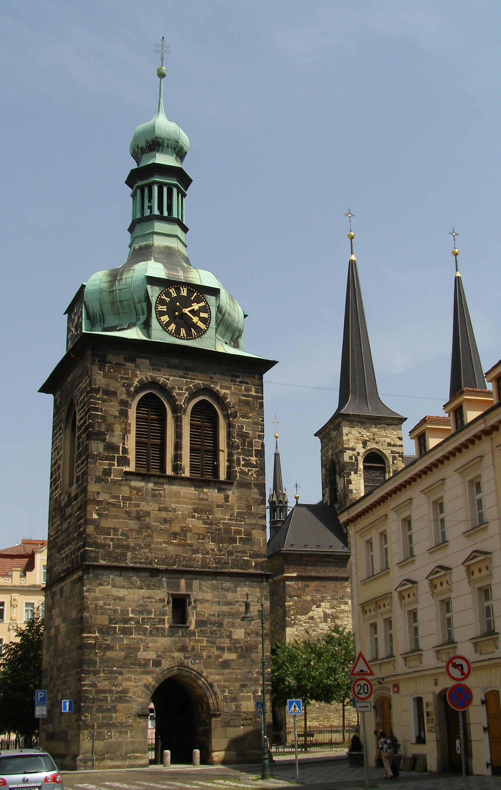 Kostel sv. Petra Na Poříčí (Nové Město), Praha 1, Petrská, zvonice čp. 1232, č. or. 14, Nové Město